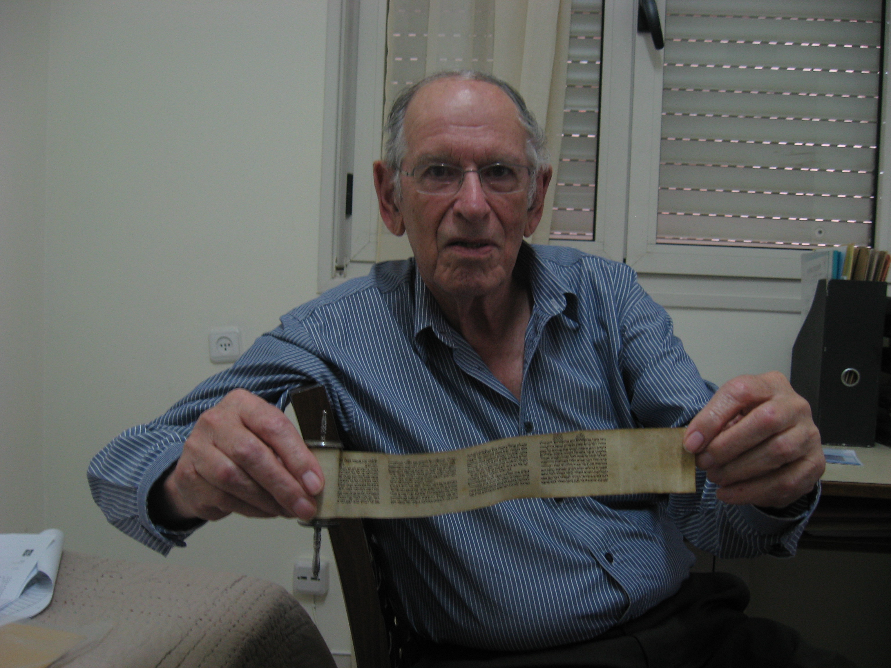 אליהו רוזנהיים מציג את המגילה שעוברת במשפחתו מדור לדור